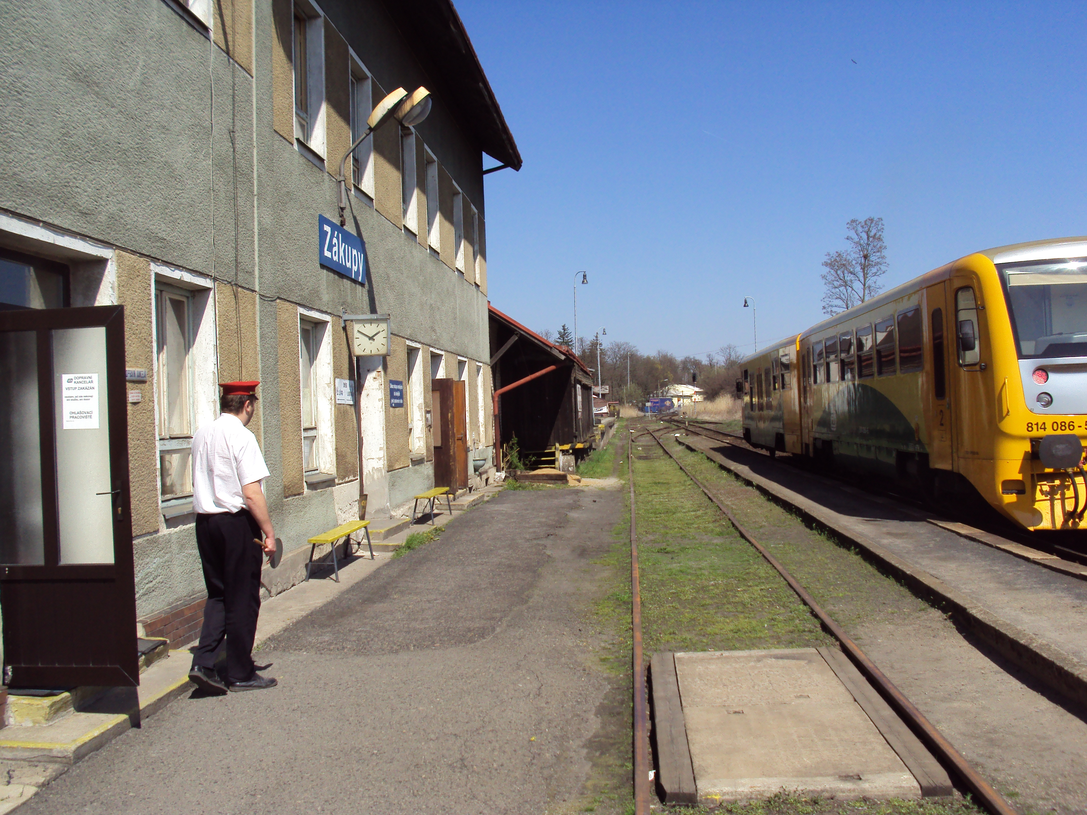 Česky: Železniční stanice Zákupy, trať z České Lípy do Liberce